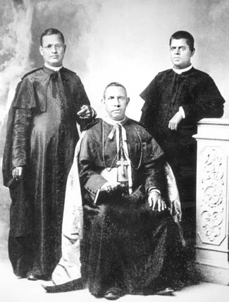 Mar Mathew Makil (mitte), Apostolischer Vikar von Kottayam